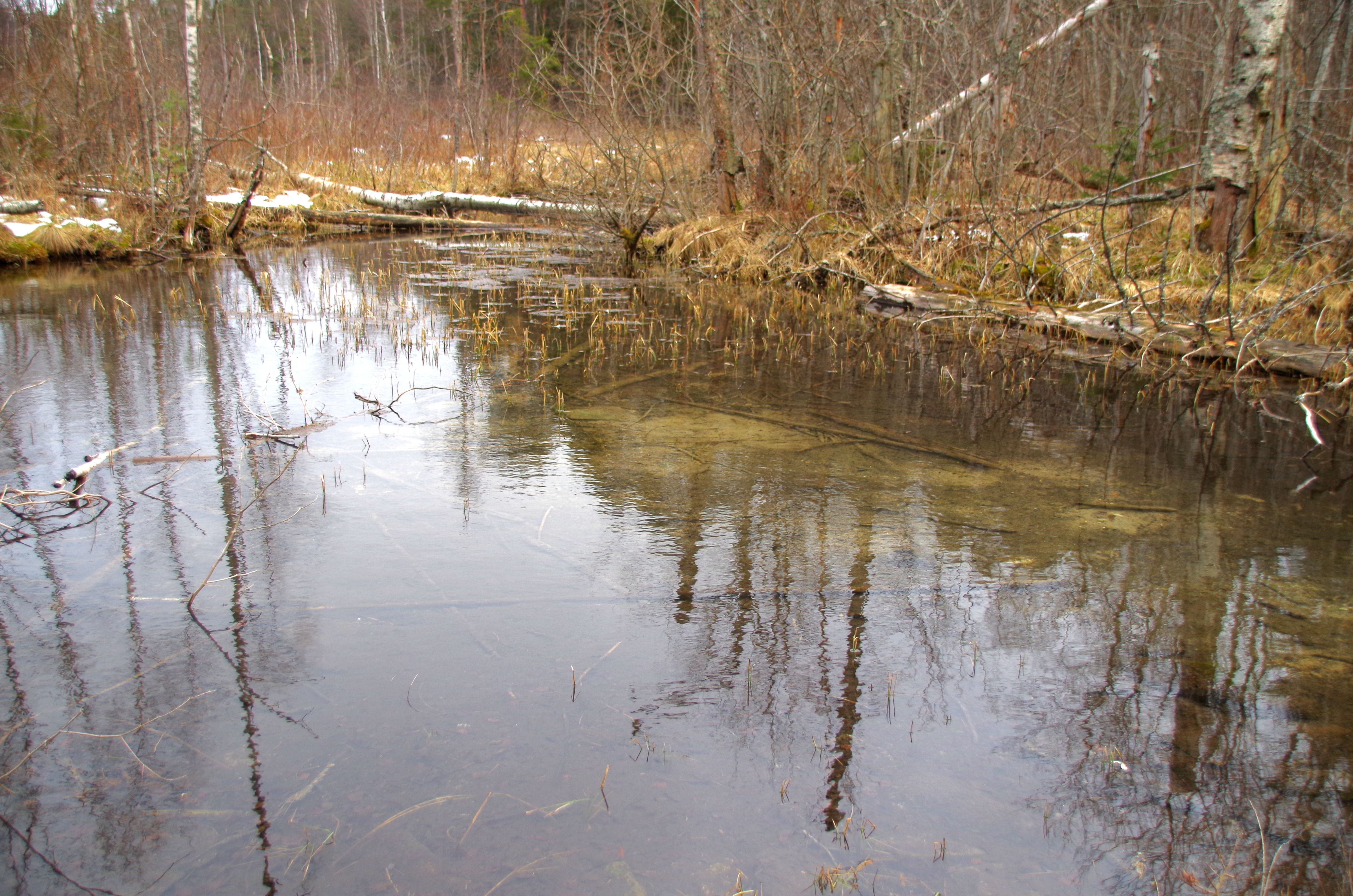 Neitsipere allikad (ka Neitsijärve allikad) on kaitsealused allikad Rapla maakonnas Märjamaa vallas Lümandu mõisa lähedal.